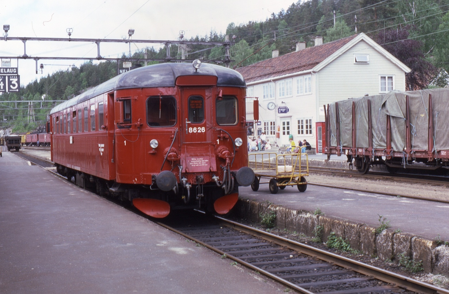 Type 86 DMU at Nelaug taken on 12 June 1986.